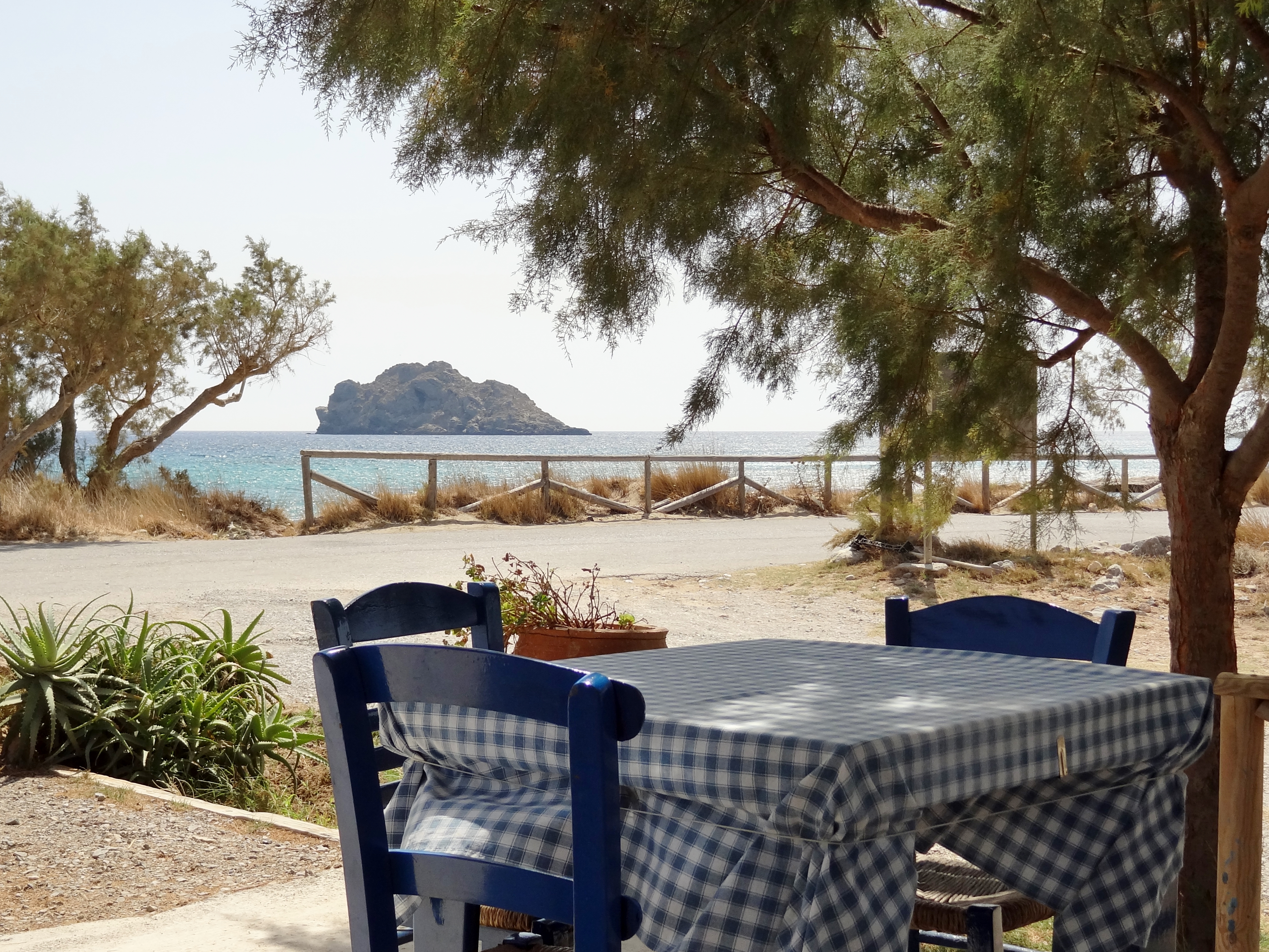 Taverne vor der Paralia Vourlia (Παραλία Βουρλιά), Strand an der Südostküste Kretas bei Xerokambos (Ξερόκαμπος), Gemeinde Sitia, Kreta, Griechenland